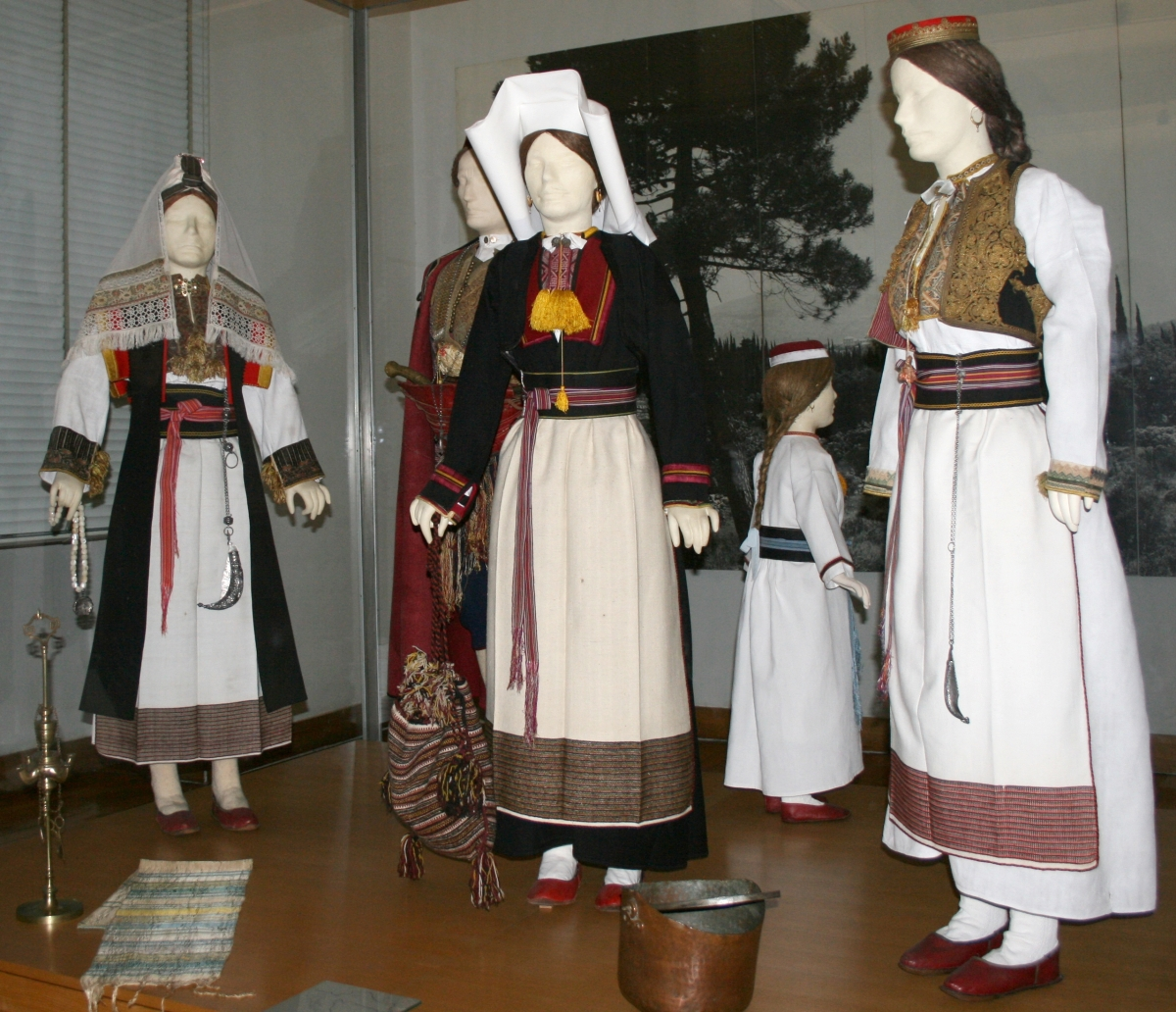 snimljeno tijekom Noći muzeja u Etnografskom muzeju u Zagrebu